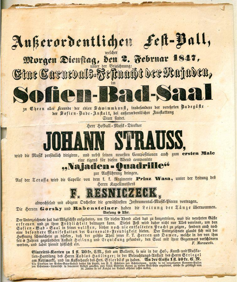 Ankündigung des außerordentlichen Fest-Balls unter der Bezeichnung "Eine Carnevals-Festnacht der Najaden im Sofien-Bad-Saal", Dienstag, 2. Februar 1847; Dirigent: Johann Strauß, Sohn